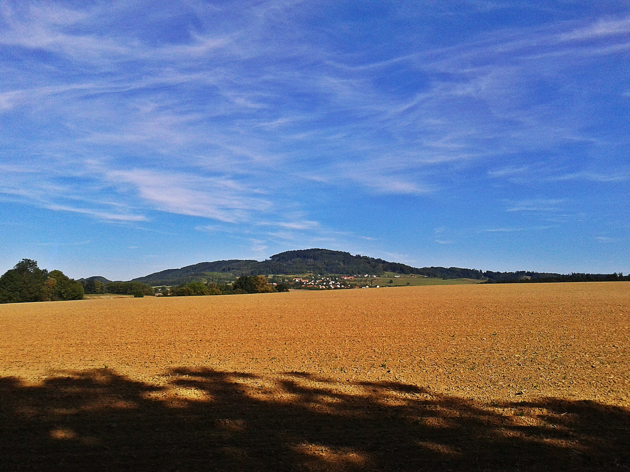 Petřkovice - Petřkovická Hůrka